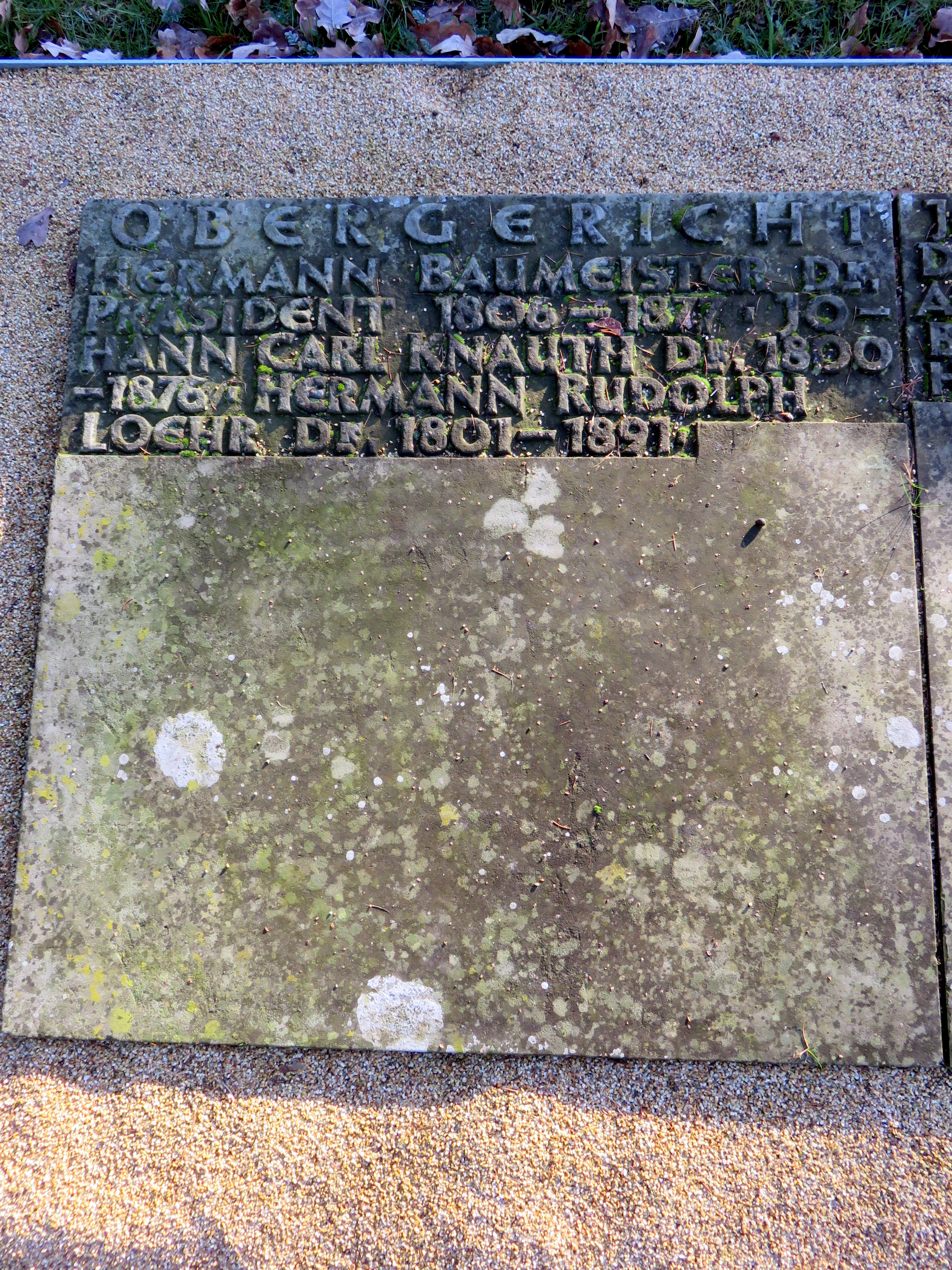 Doppelsammelgrab Obergericht im Bereich des Althamburgischen Gedächtnisfriedhofs auf dem Hamburger Friedhof Ohlsdorf zu Ehren von unter anderem Hermann Baumeister, Johann Carl Knauth, Johann Friedrich Voigt.